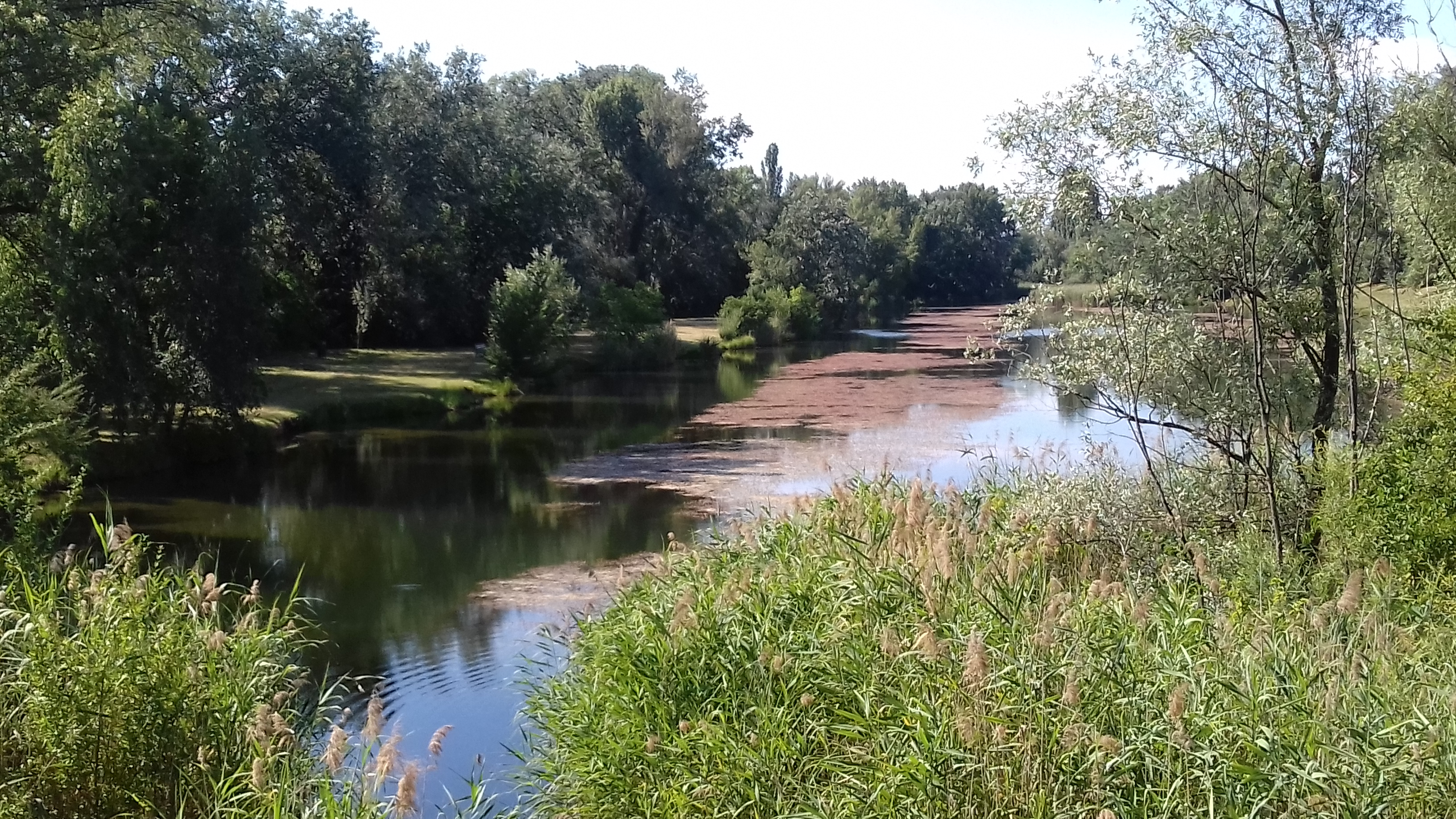 Das Mühlwasser von der Mühlwasserbrücke (beim Biberhaufenweg) aus, mit besonders starker Ausbreitung von Makrophyten im Sommer 2018 Diese Datei wurde im Rahmen von WikiDaheim 2018 in Österreich erstellt und hochgeladen.Sie wurde dem Themenbereich Öffentliche Güter zugeordnet.